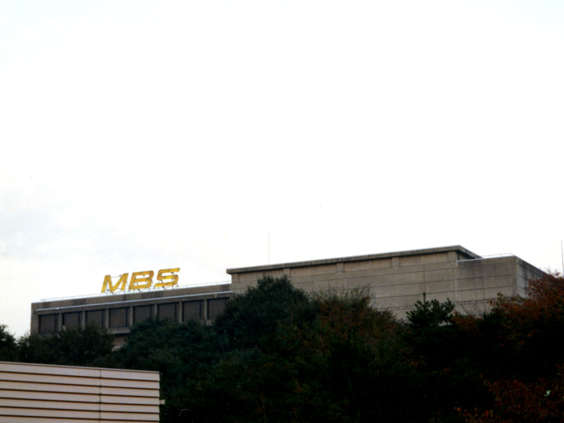 Myrica Hall,Senrioka-kita Suita-City Osaka Japan.